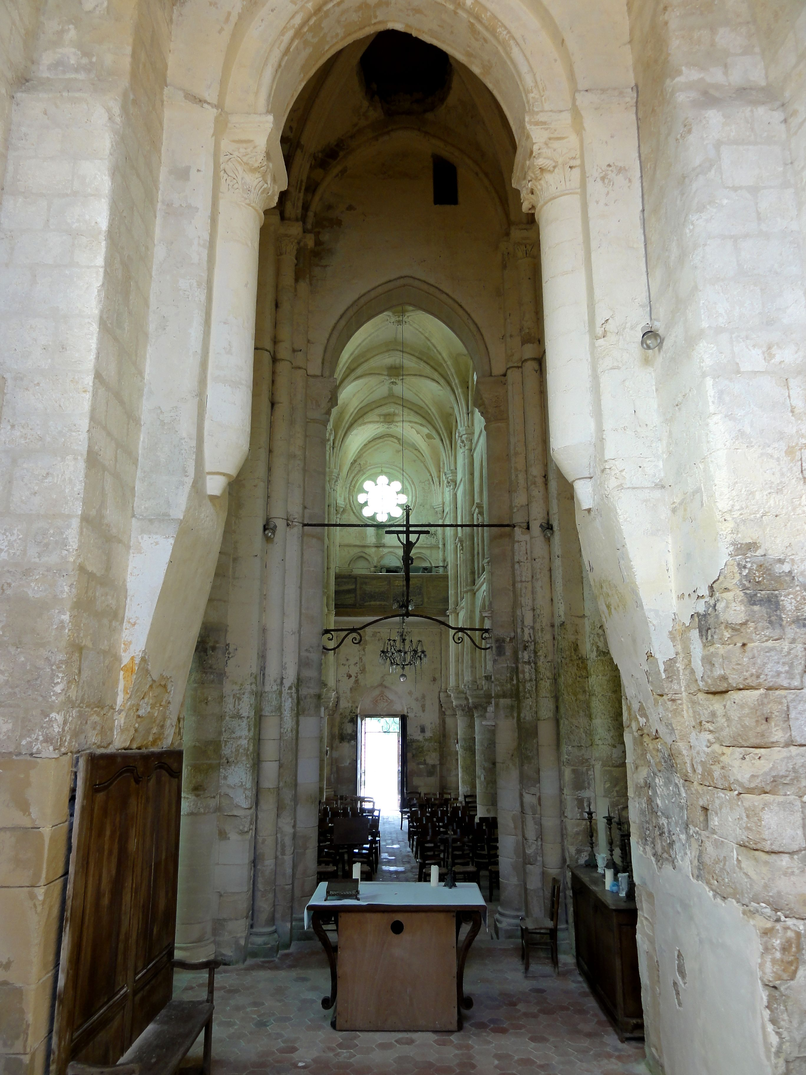 Chœur, vue vers l'ouest.